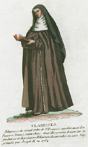 Collection de costumes de tous les ordres monastiques, supprimés à differentes époques, dans la ci-devant Belgique, Bruxelles, Philippe Joseph Maillart et sœur, 1811